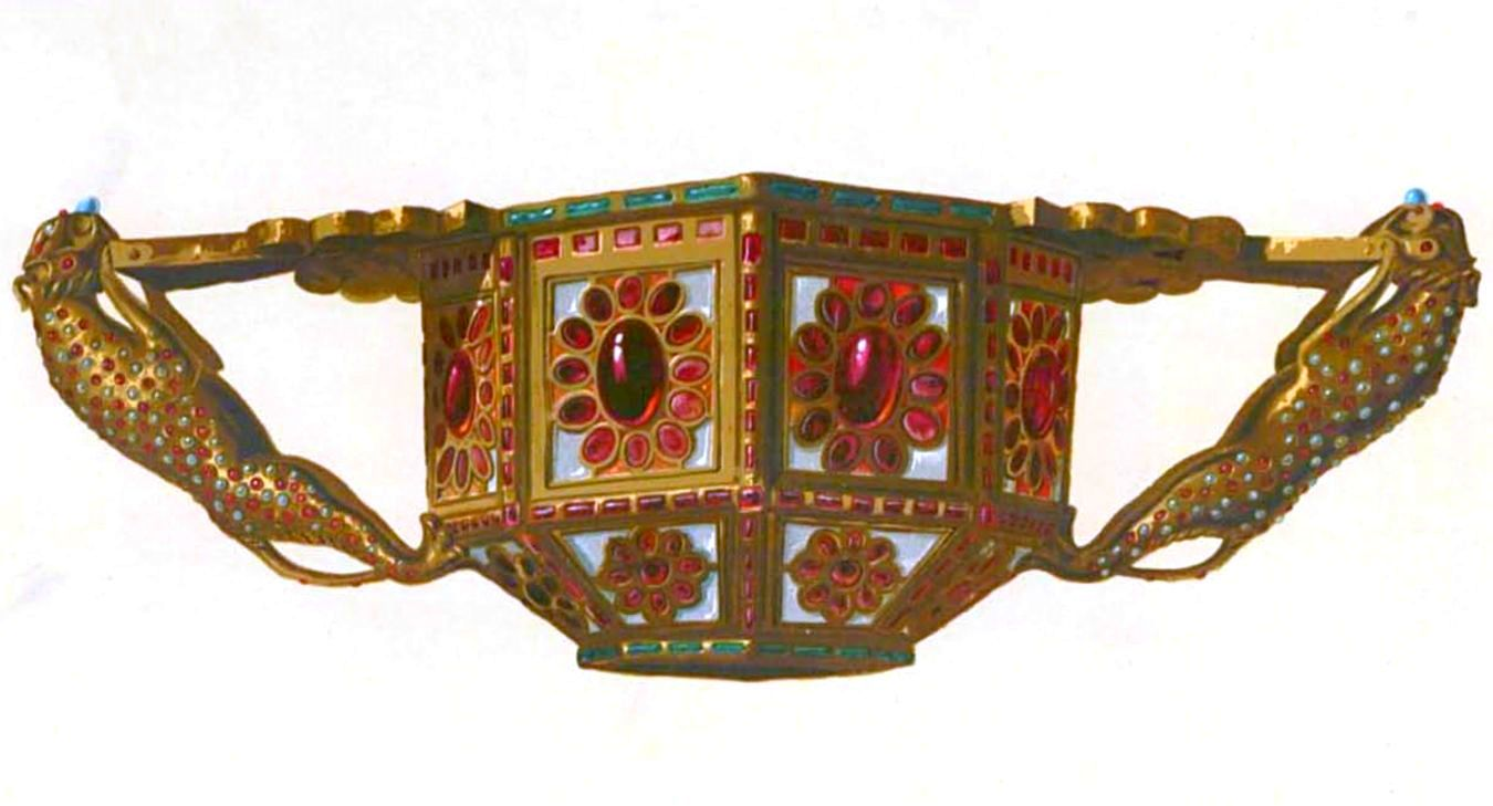 Vasul octogonal - reproducere Alexandru Odobescu